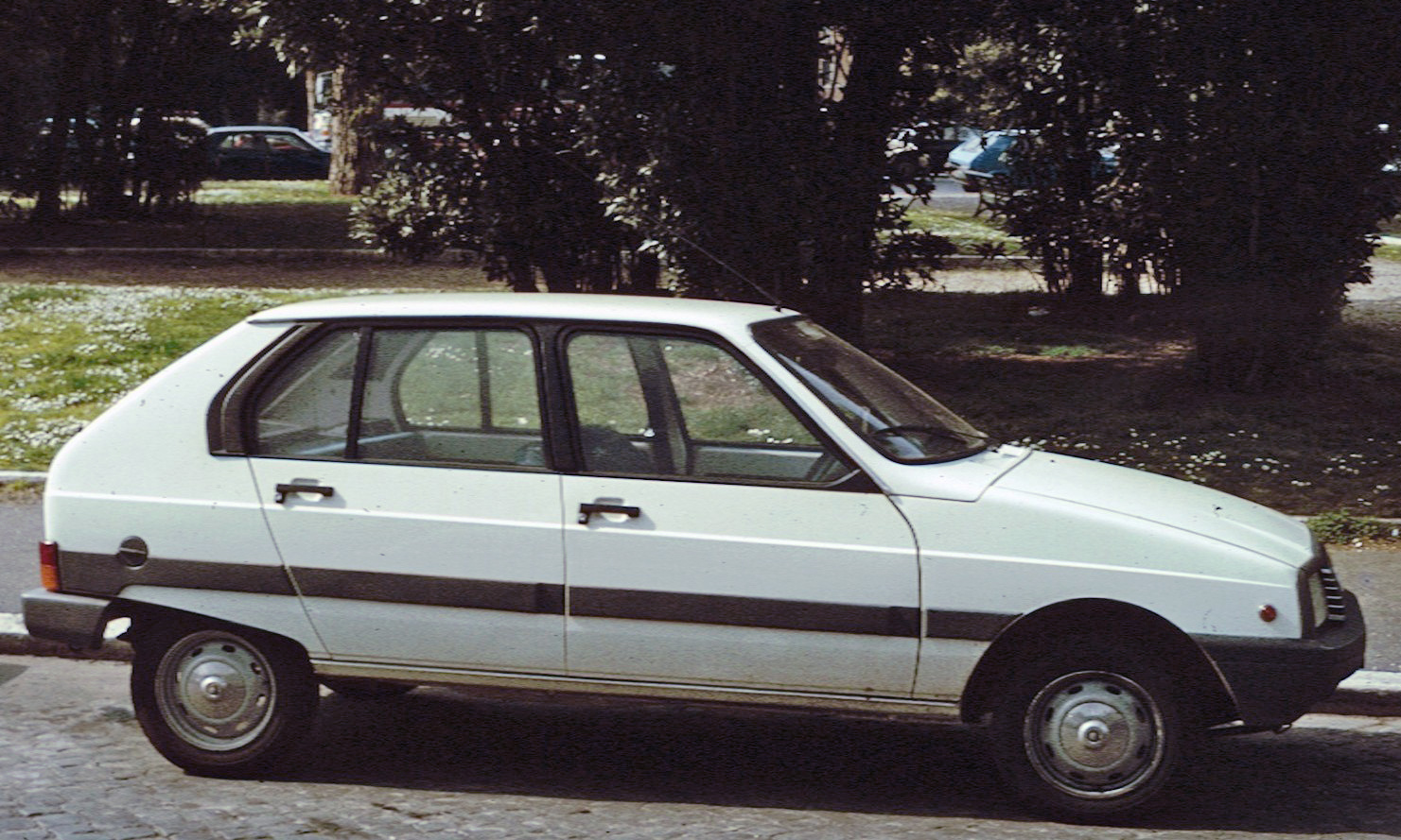 Citroen Visa post facelft side profile